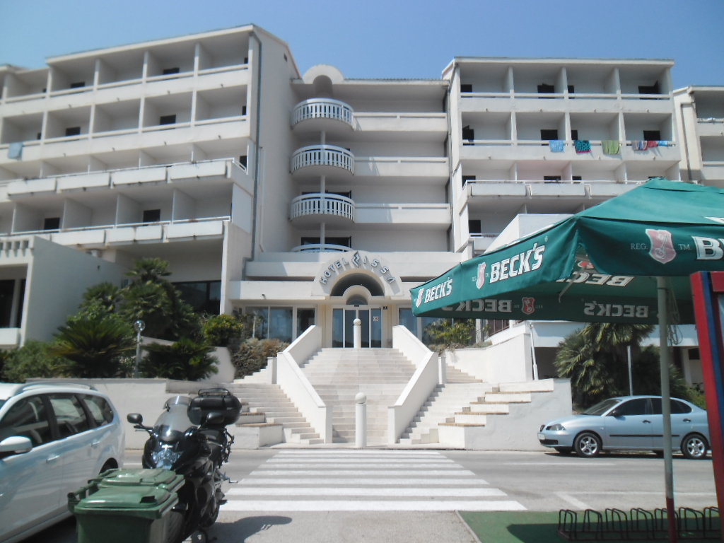 grad Vis